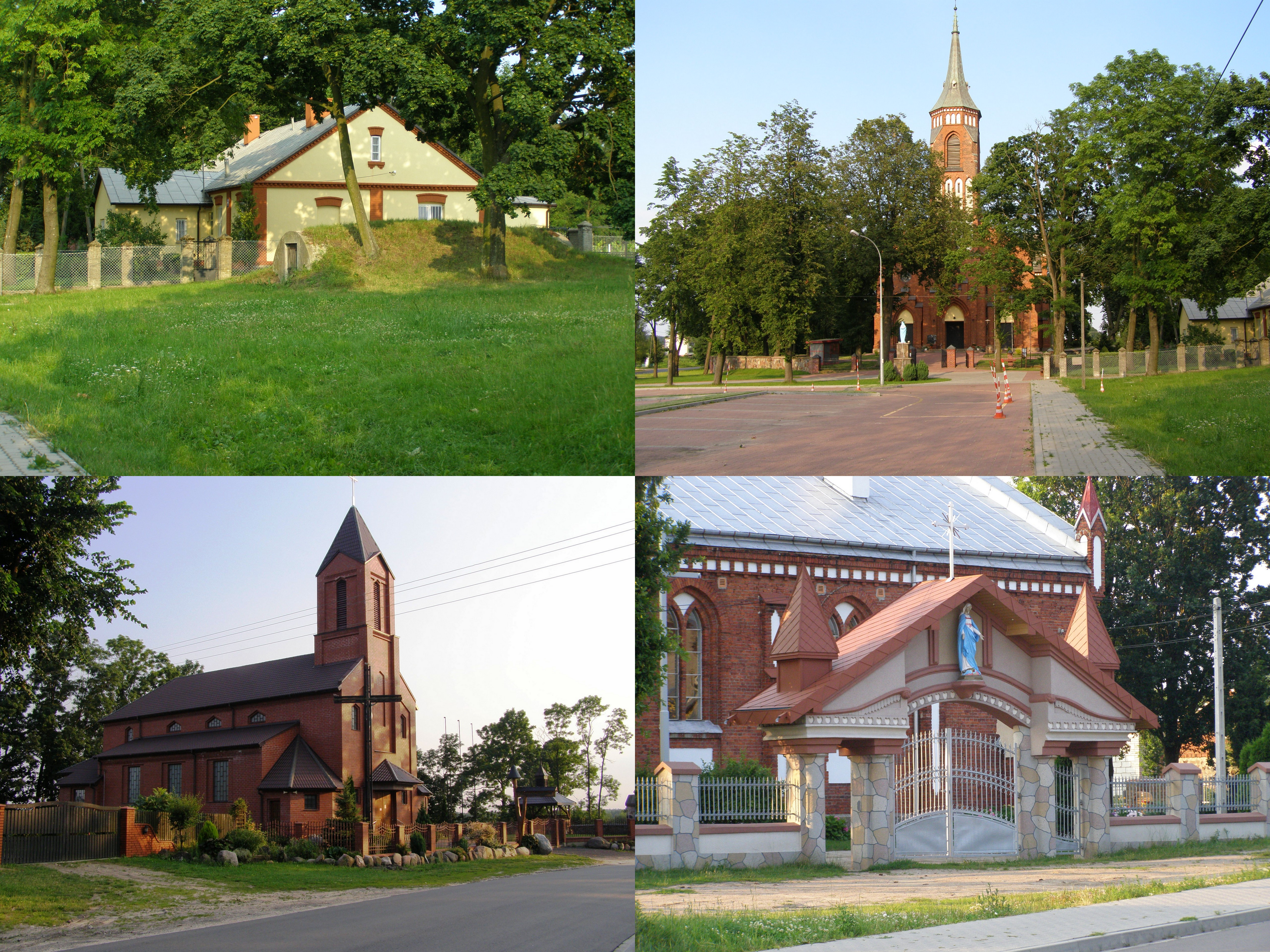 Na górze Jakubów, na dole Wiśniew.